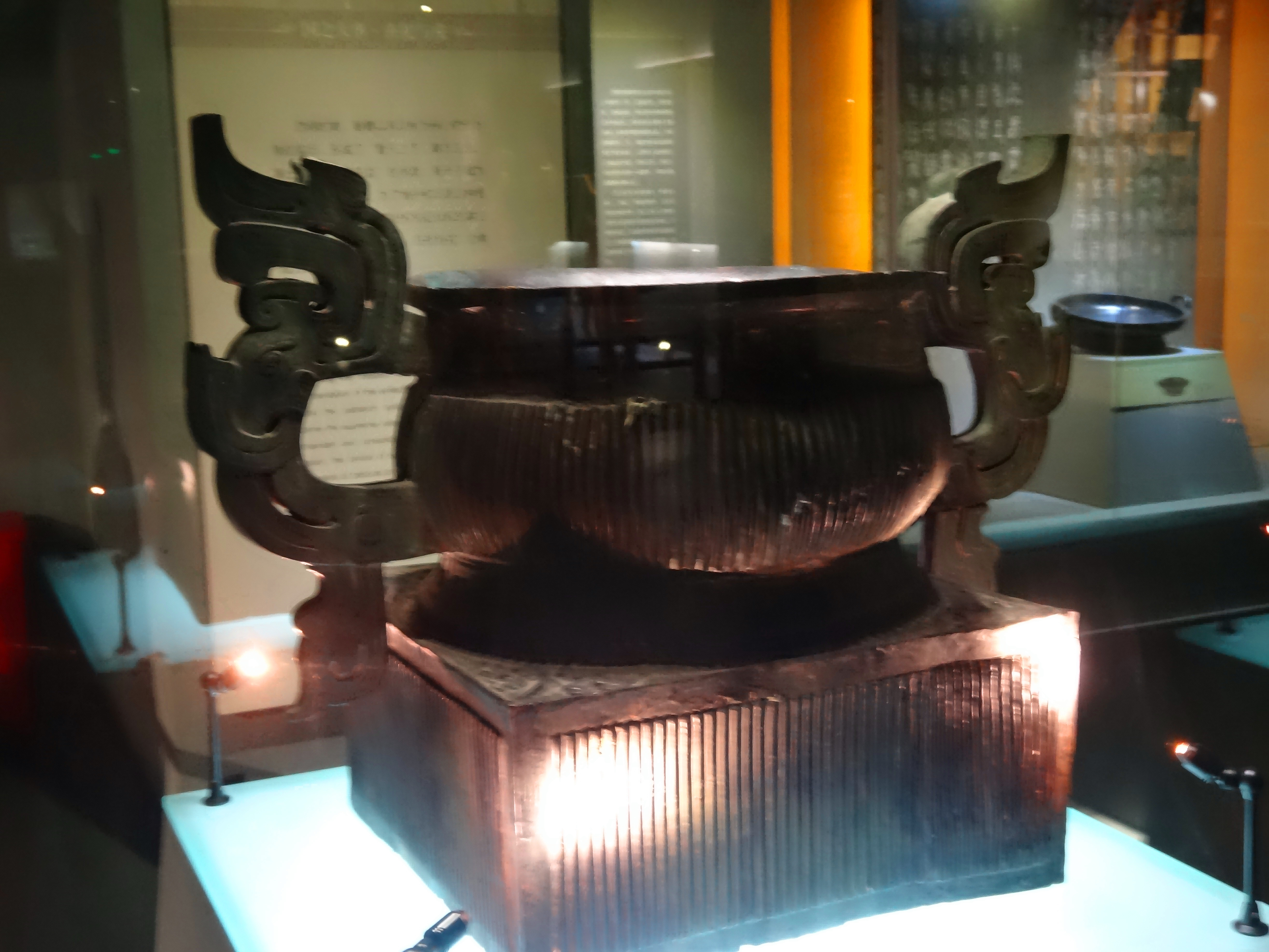 胡簋，又称㝬簋。1978年5月陕西扶风出土，铭12行124字。高59cm，长43cm。是目前存世商周青铜簋中最大的一件。